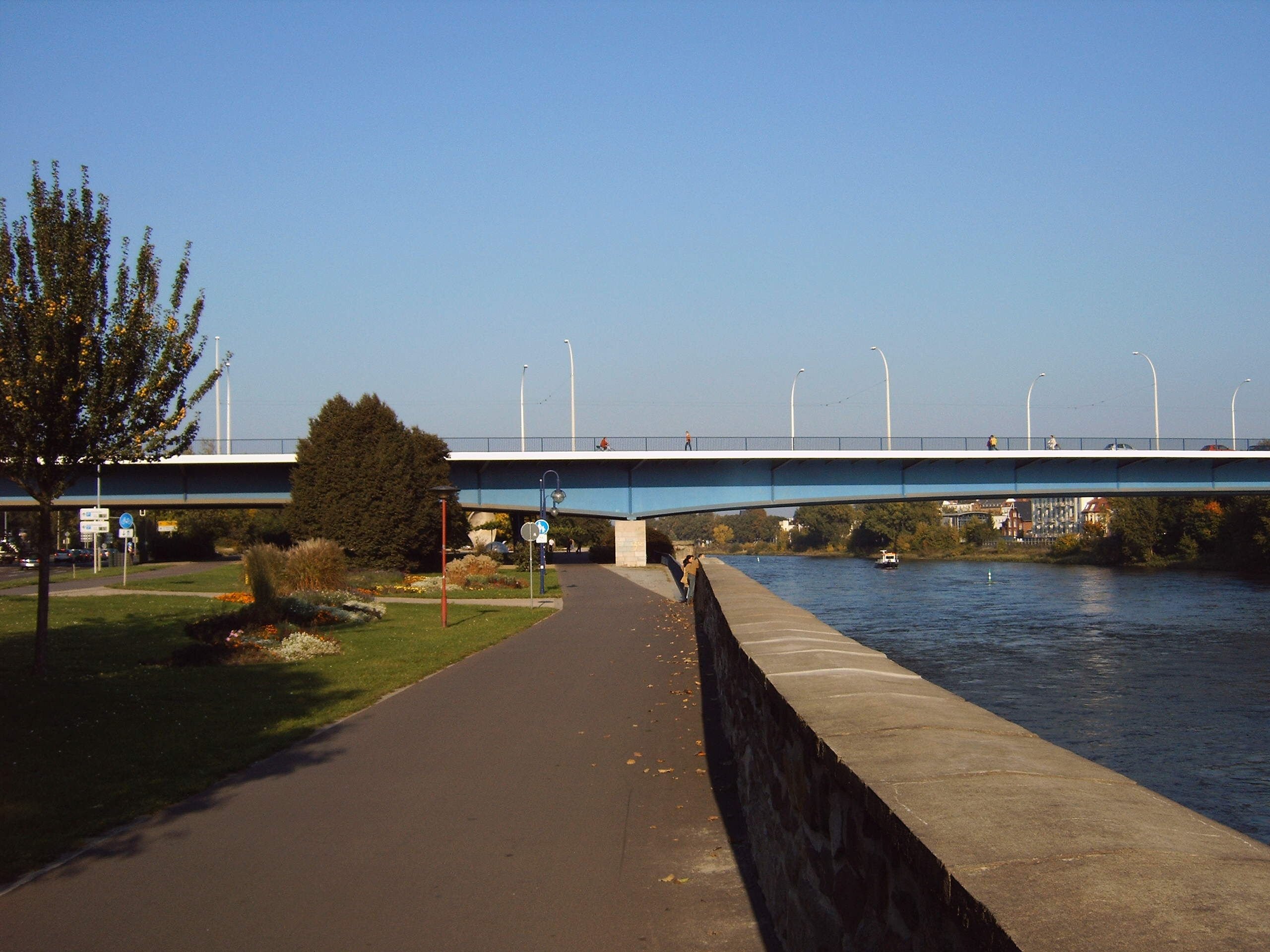 Neue Strombrücke Magdeburg, Brücke über die Elbe, Bild selbst aufgenommen am 11.10.2005